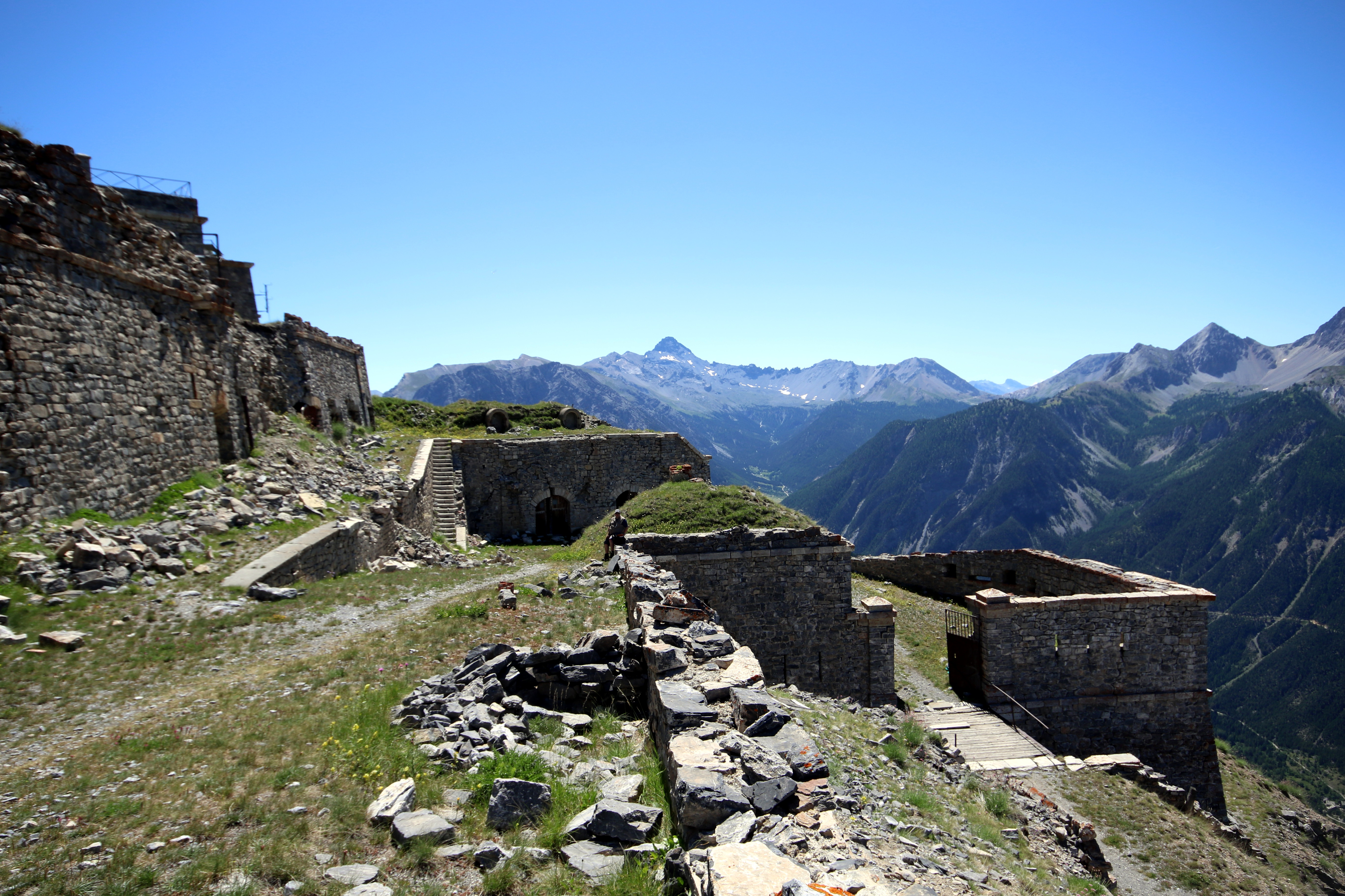 Vue d'ensemble de l'entrée.